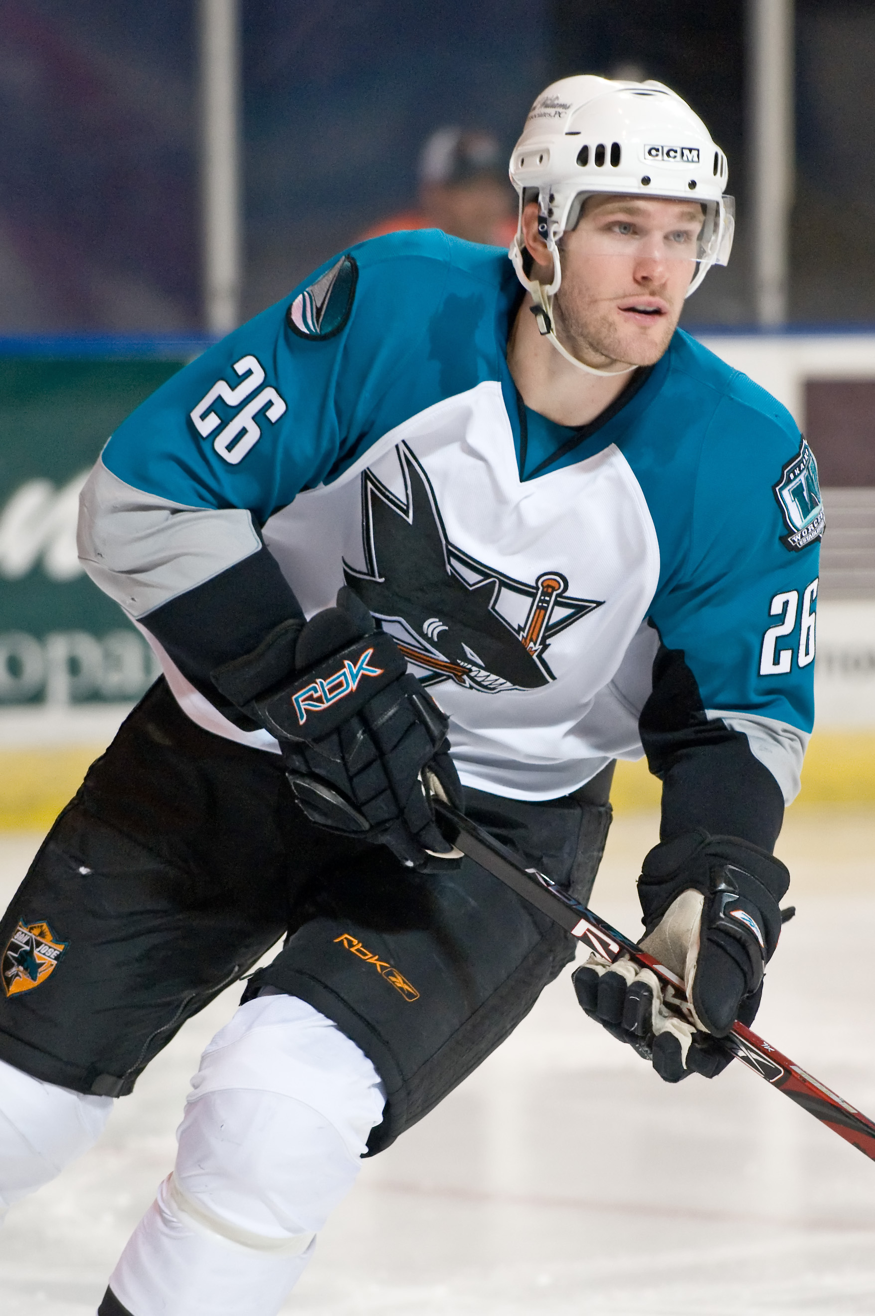 Dennis Packard